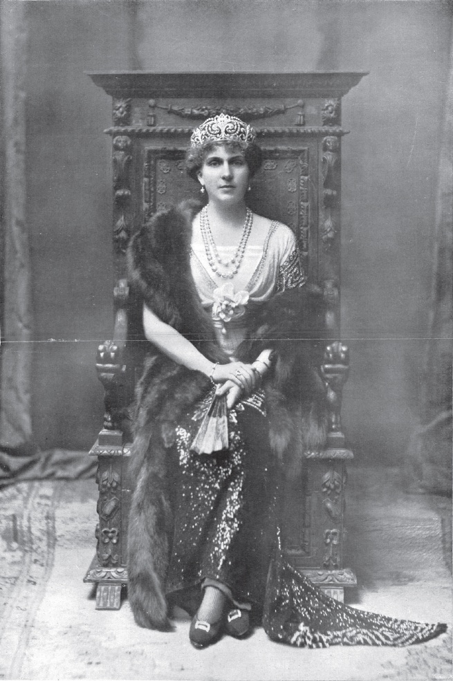 S. M. la Reina Doña Victoria, obra del fotógrafo Christian Franzen, recogido en la revista española Mundo Gráfico.